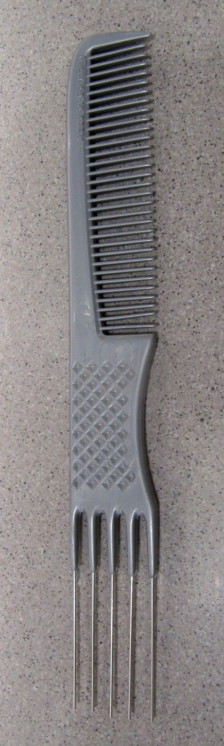 Toupierkamm